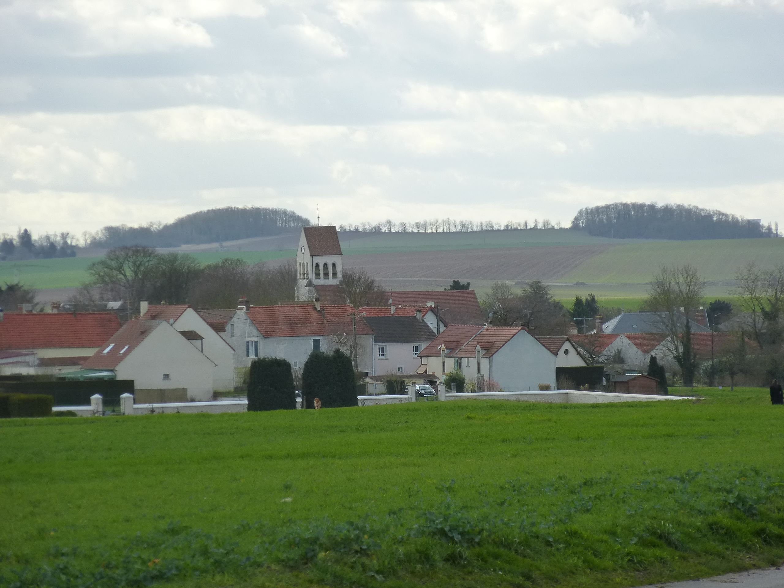 Village de Marcilly. (Seine-et-Marne, région Île-de-France).